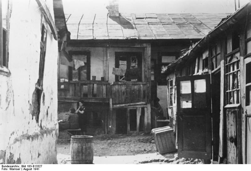 Kischinjow, Ghetto, Gebäude Scherl: Im Judenghetto von Chisinau. [Kischinjow] PK-Aufnahme: Kriegsberichter: Wamser Aug. 41 8526-41